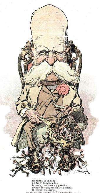 El Intendente Manuel Obarrio, caricaturizado por Mayol y llamado en un poema "colador" de abogados.